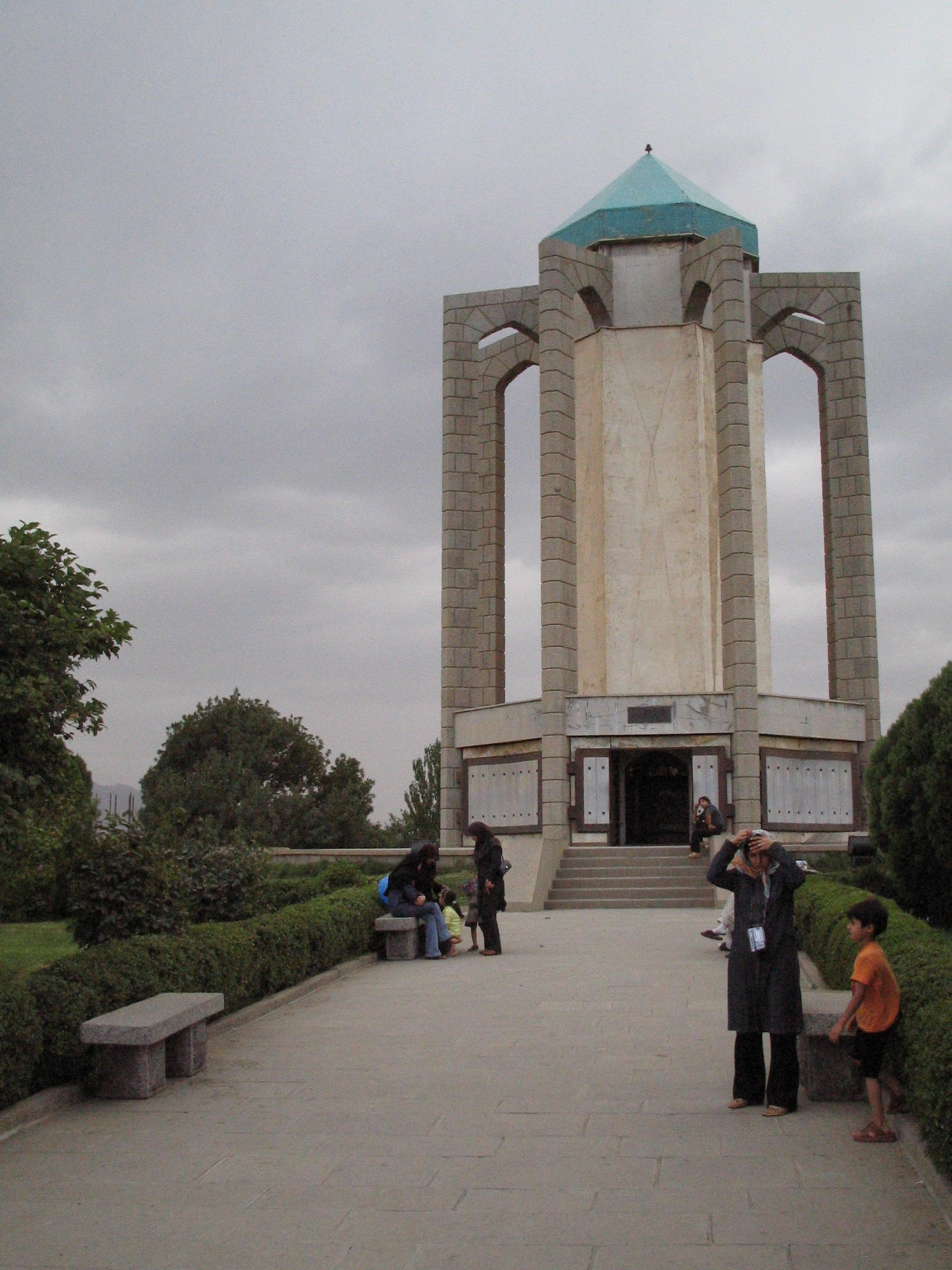 Baba Taher Mausoleum in Hamedan, Iran.